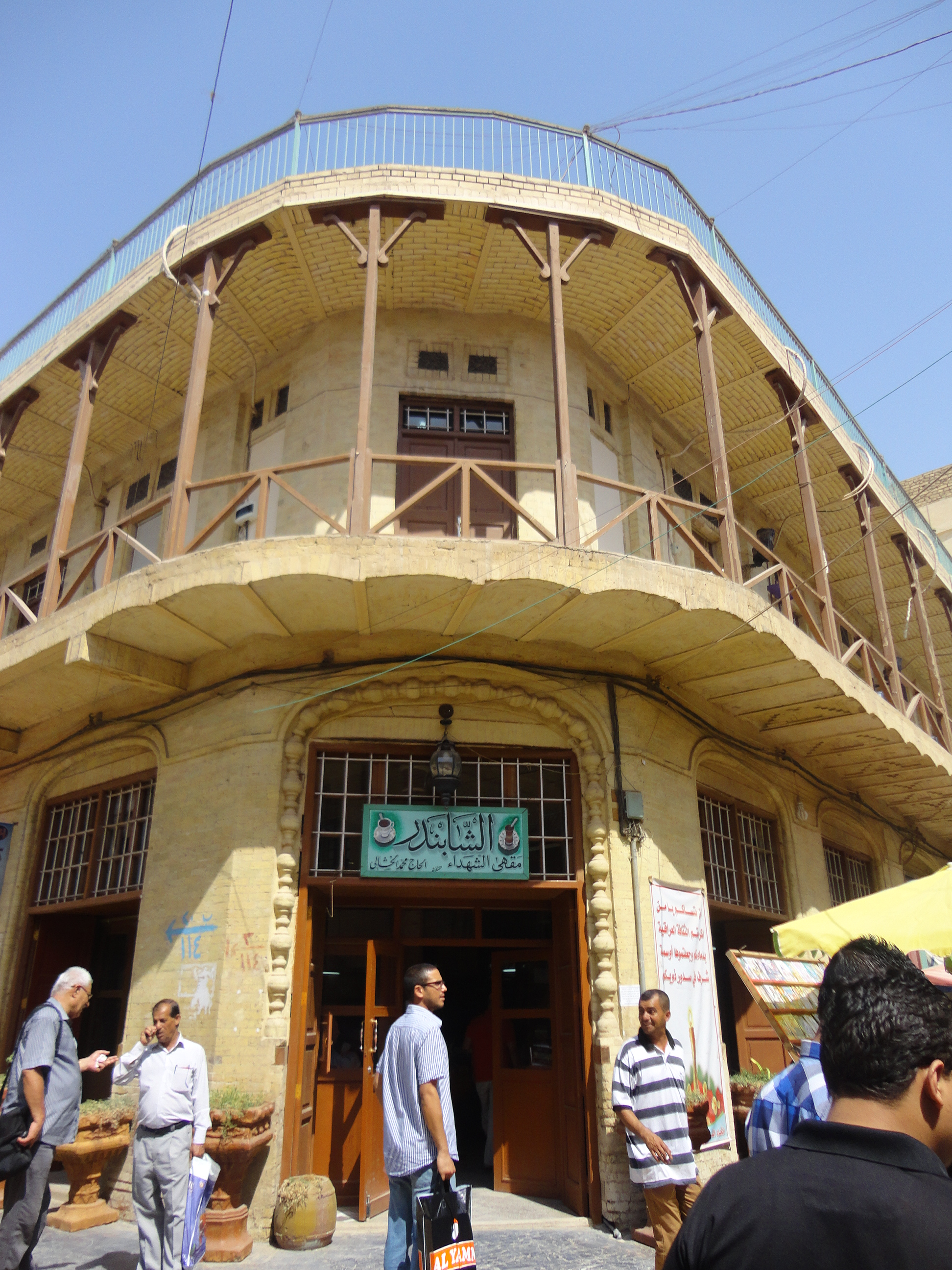 مقهى الشابندر صيف 2012